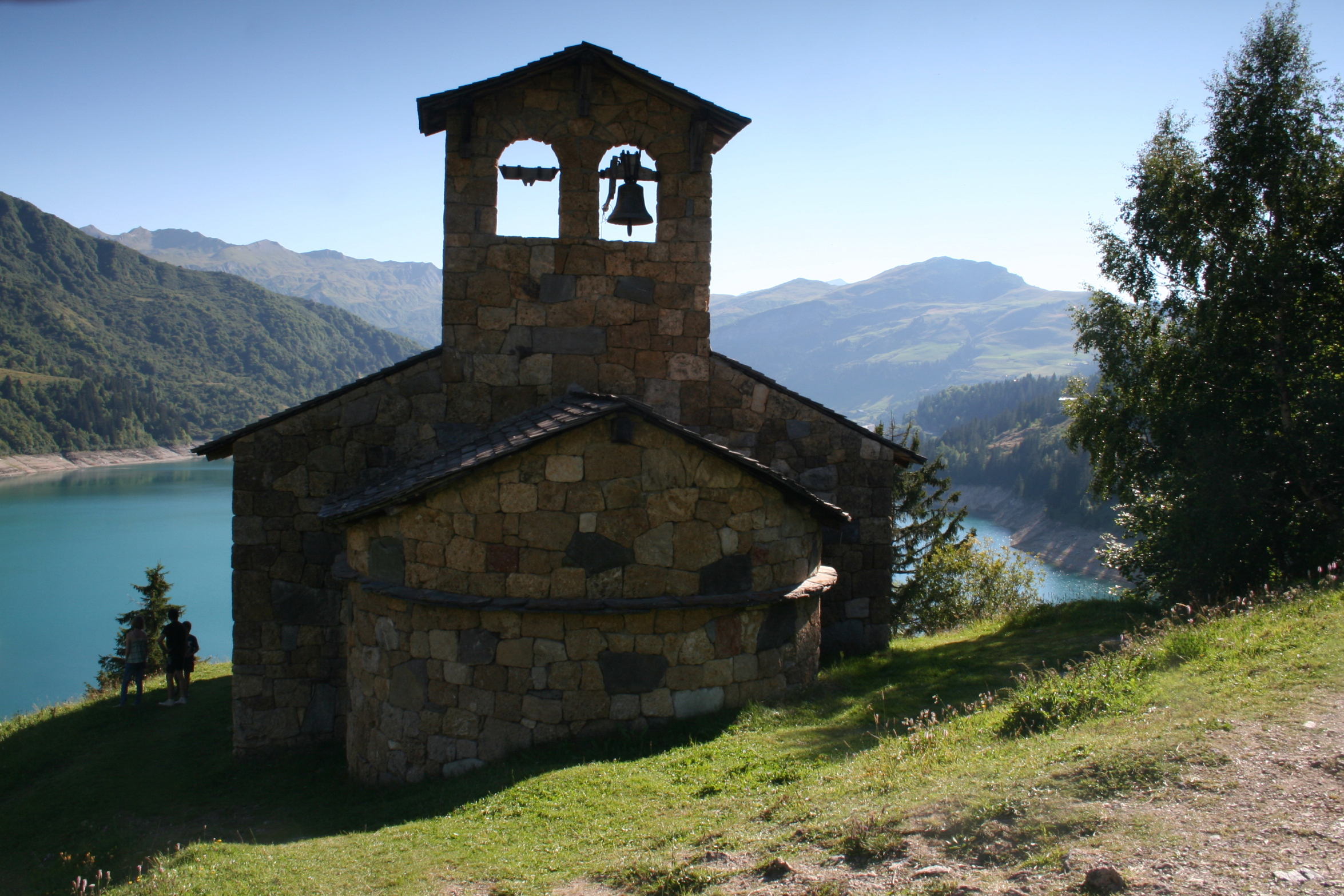 Chapelle de Roselend, déplacée et recontruite pierre par pierre par les habitants du village de Roselend, avant que celui-ci ne soit submergé par les eaux.